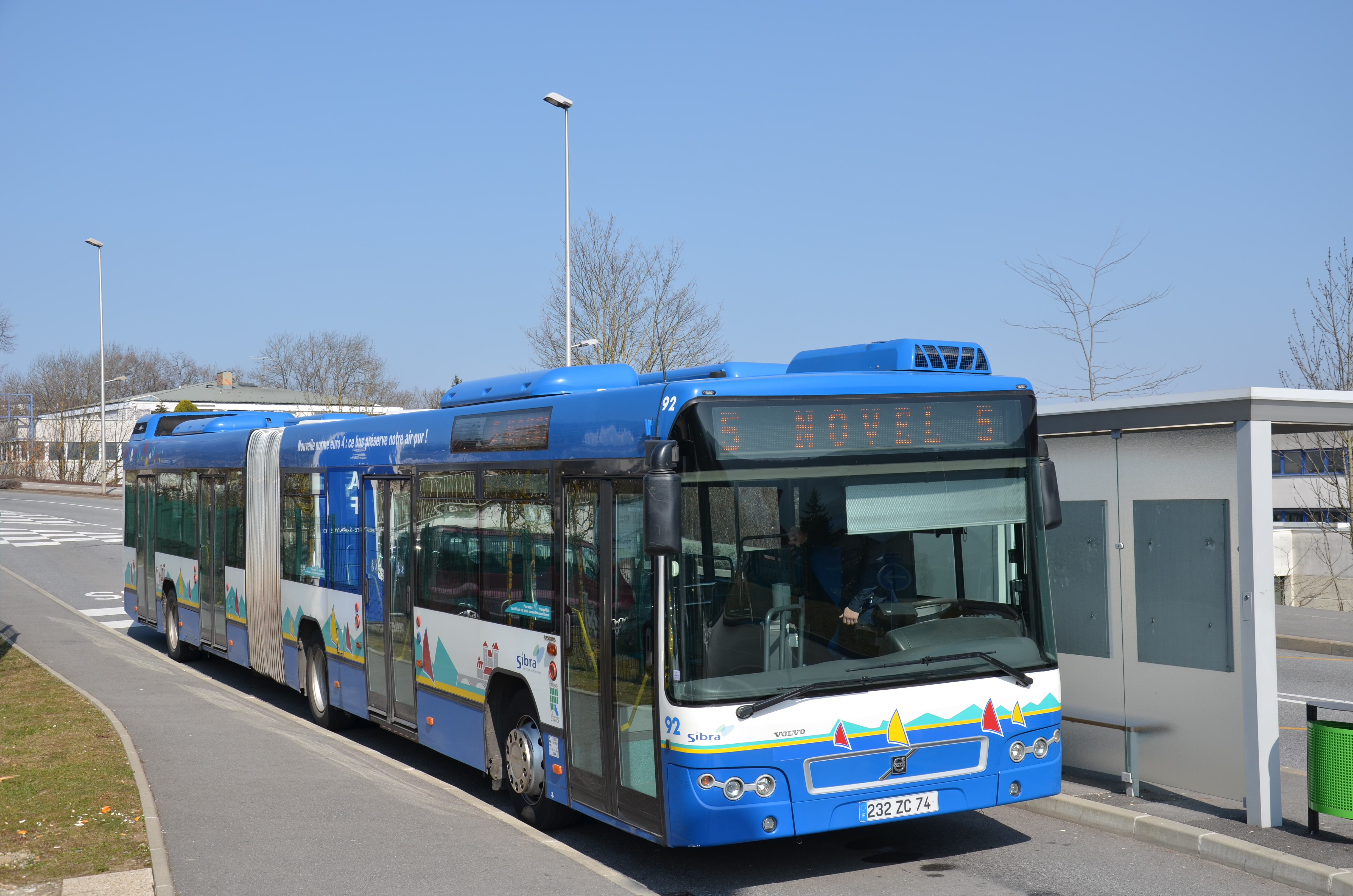 Volvo 7700 A n°92 sur la ligne 5 du réseau SIBRA d'Annecy, au terminus Seynod Polynôme.